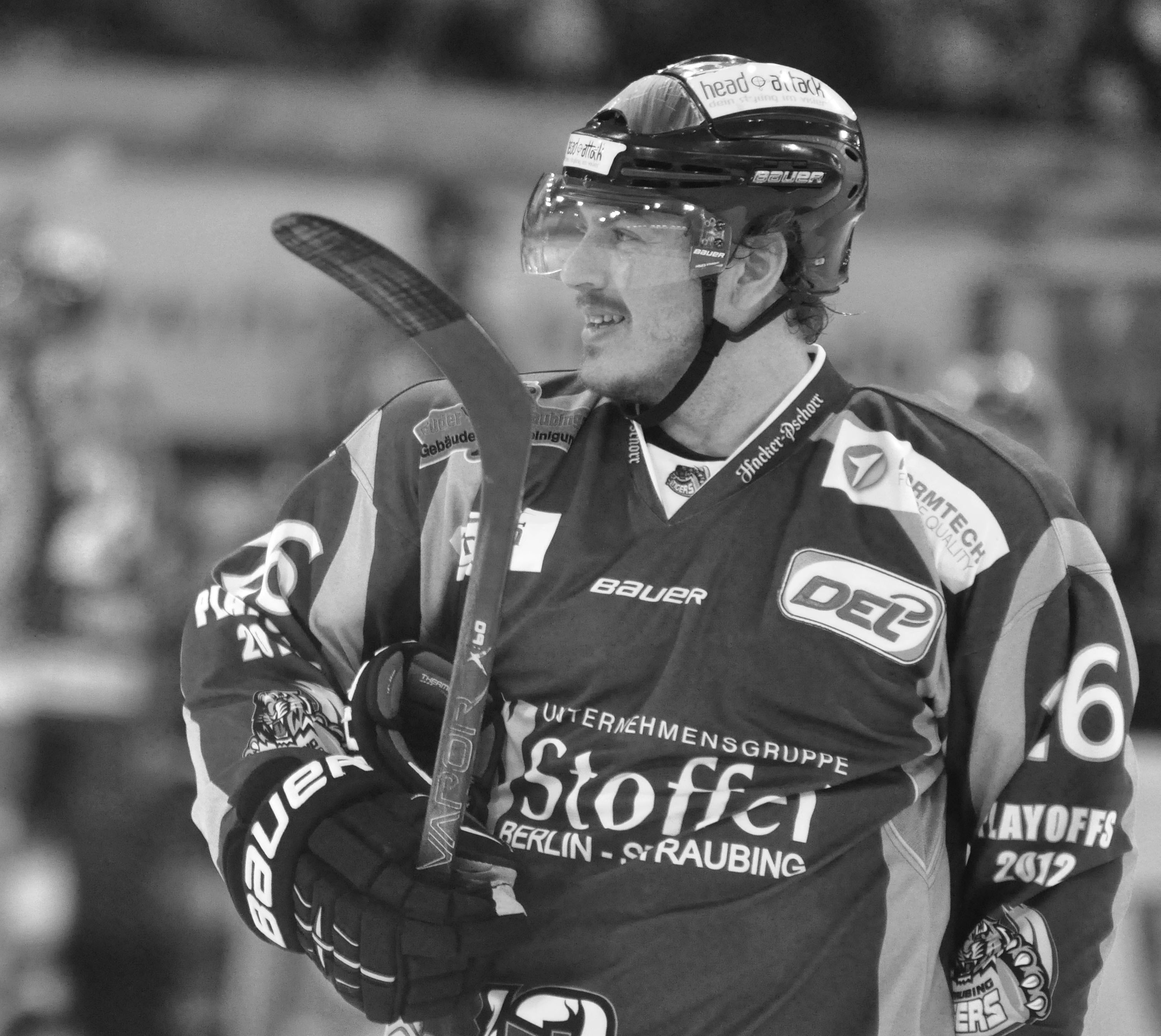 Straubing Tigers - Eisbären Berlin 07.04.2012 DEL PlayOff Halbfinale